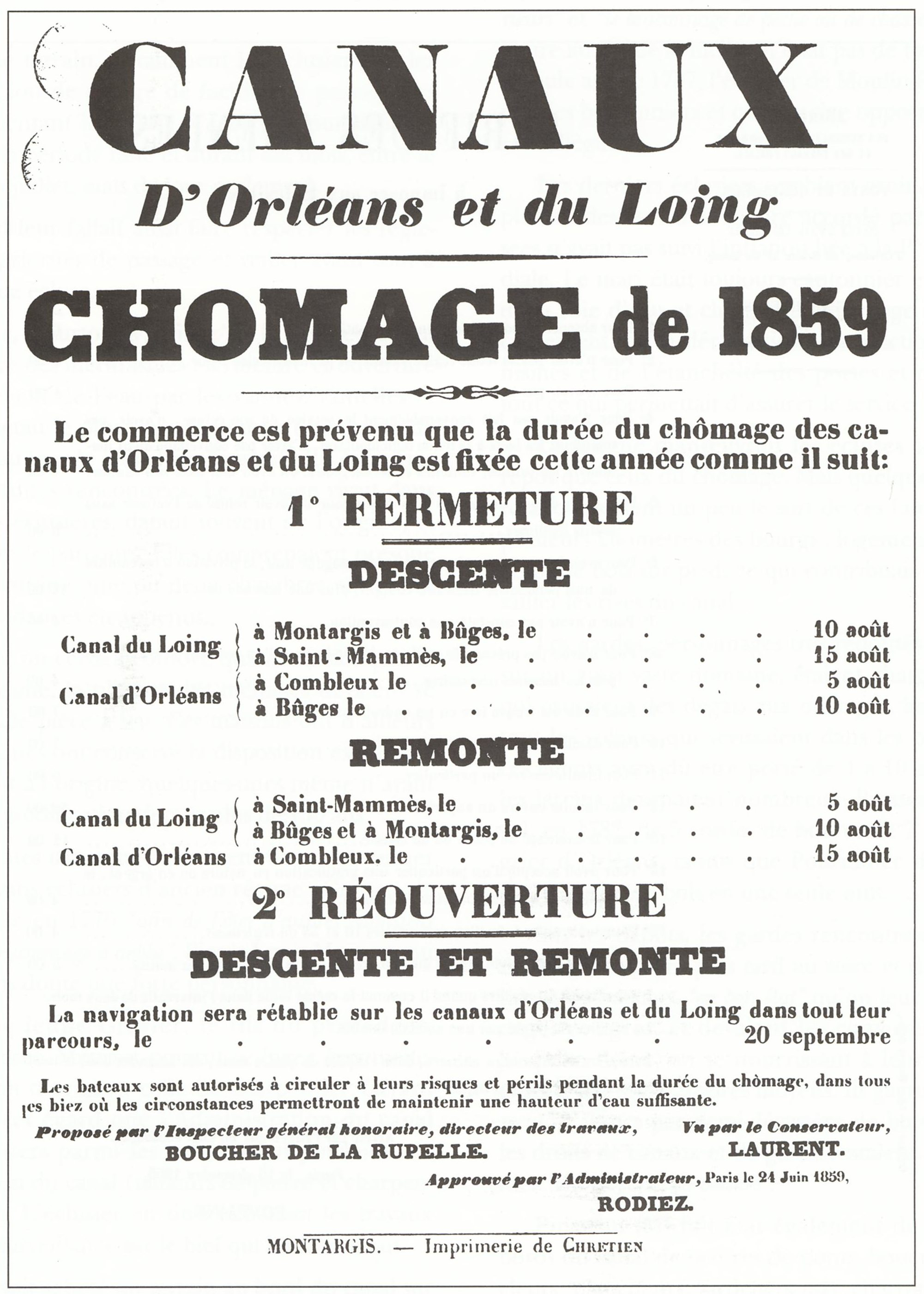 Canal d'Orléans. Avis de chomage de 1859 (fermeture du canal par insuffisance d'eau).